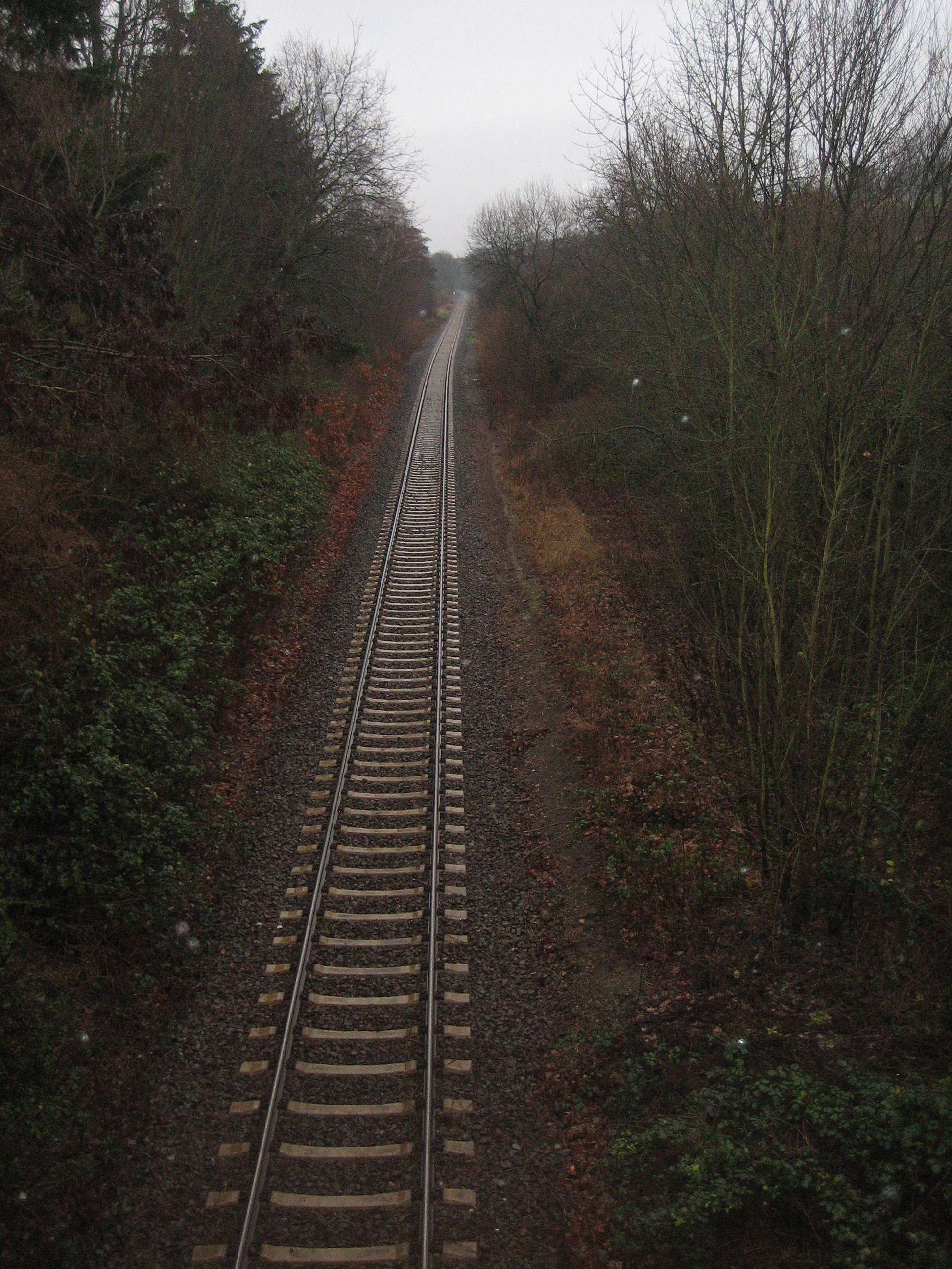 Bereich des früheren Bahnhof Ebertsheim Haltepunkt